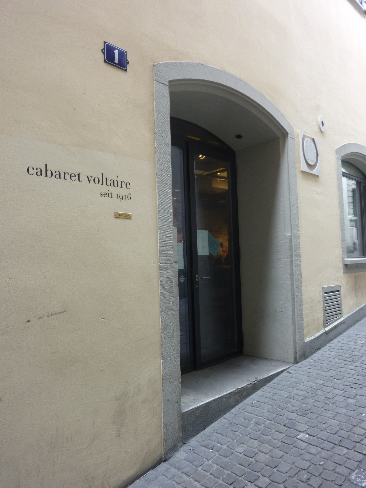 Eingang zum Cabaret Voltaire in Zürich